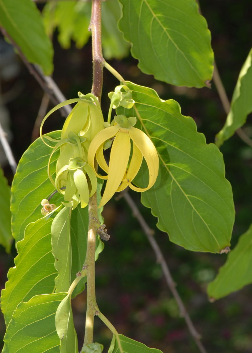 Fleur de Ylang-Ylang dont les pétales dégagent une odeur pénétrante, épicée rappelant les œillets, les narcisses et le jasmin.